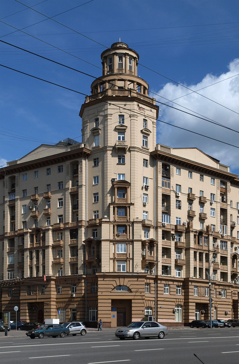 Malaya Sukharevskaya Square, Moscow